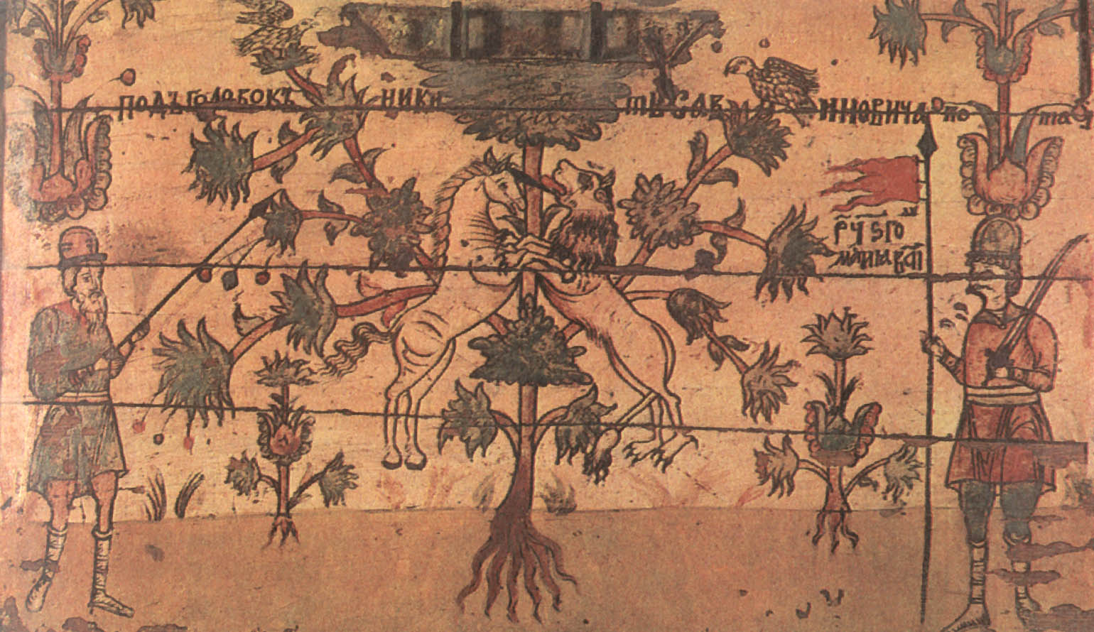 Легендарное «древо жизни» и вооруженная «стража» сундука. Северная Двина. Район Борка. 1688 год.